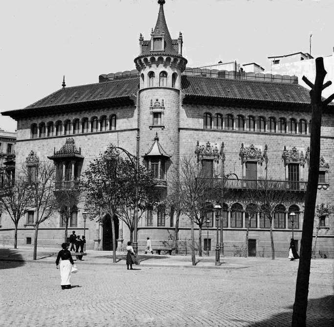 Casa a la Rambla Catalunya de Barcelona. Josep Salvany i Blanch (1912)